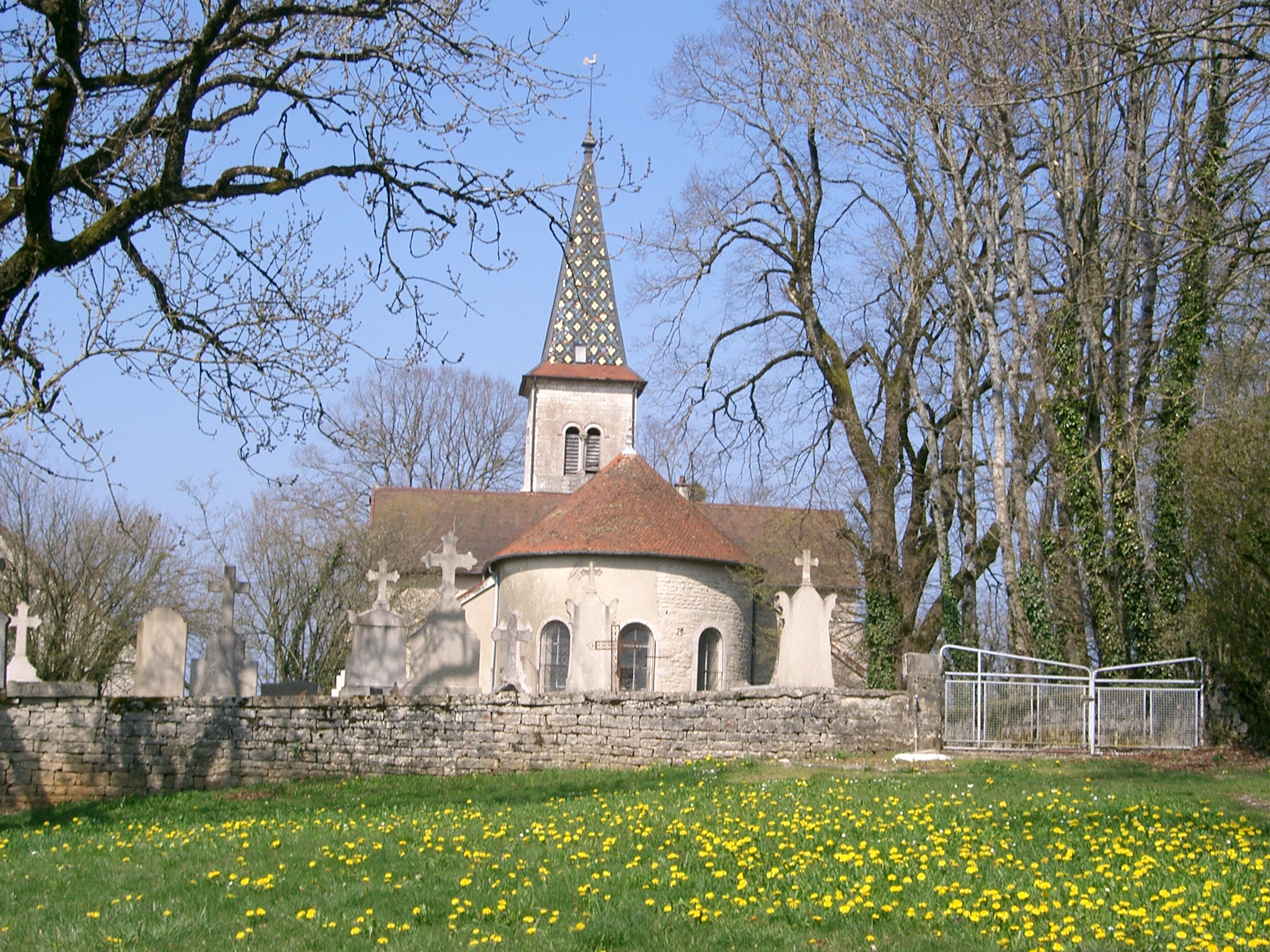 Fay-en-Montagne (Jura - France) - Église dédiée à saint Ferréol et saint Ferjeux, reconstruite vers 1860 et rénovée en 1970